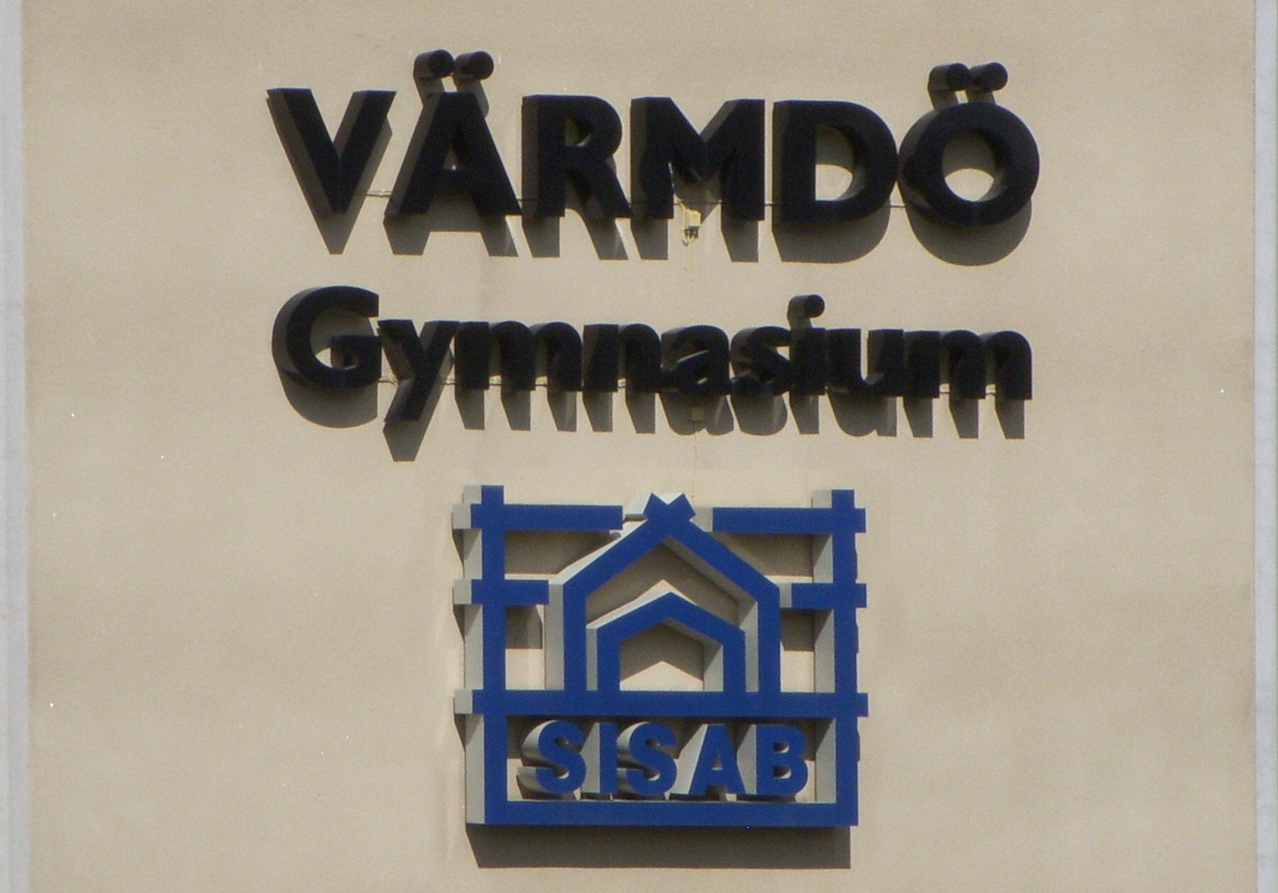 Värmdö Gymnasium, Årsta